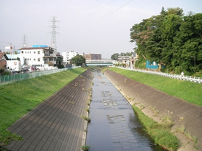 乞田川（下流）